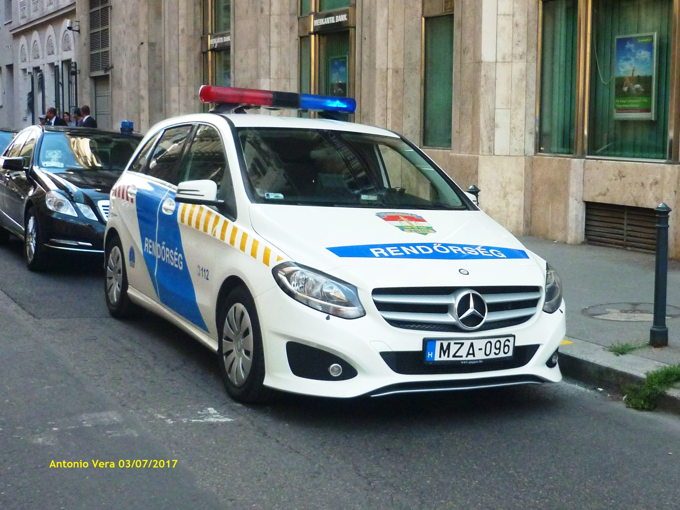 Rendőrség(MZA-096)